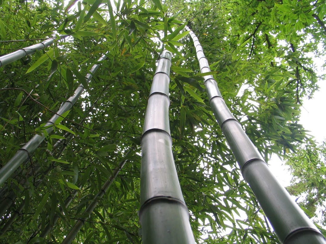 Phyllostachys vivax Huangwenzhu